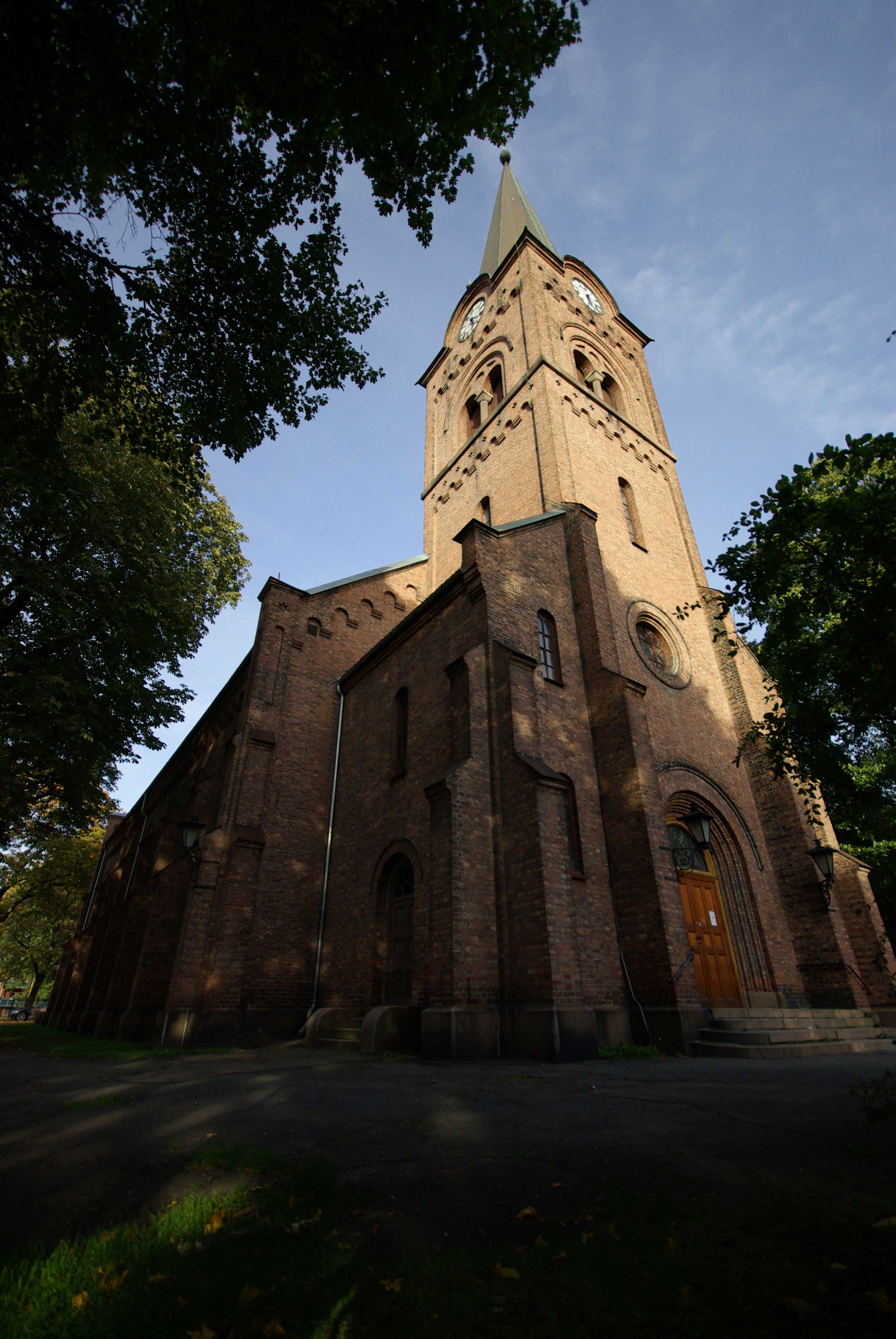 Sofienberg kirke ligger i Rathkes gate 18 i Oslo